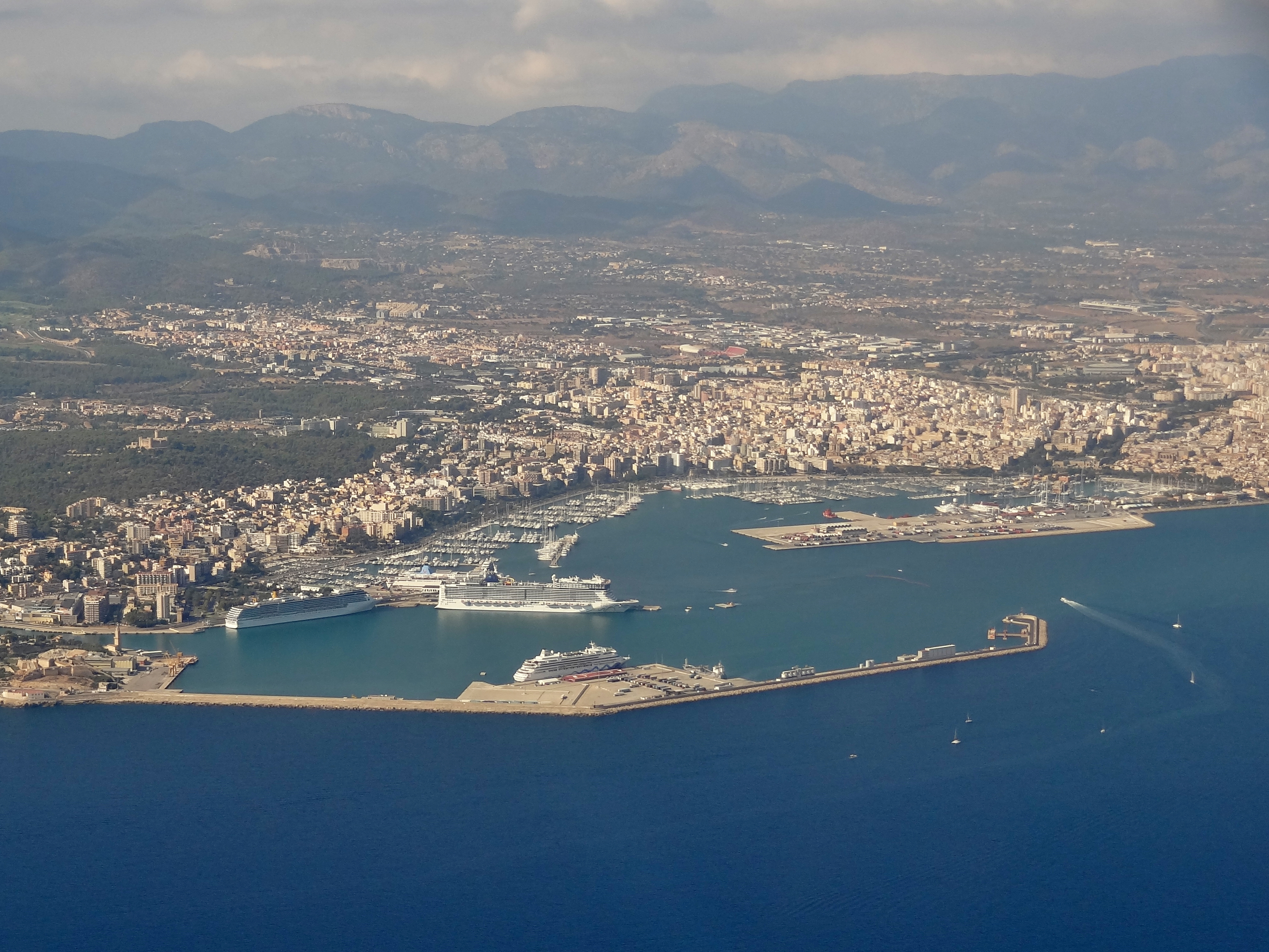 Hafen von Palma, Mallorca, Spanien